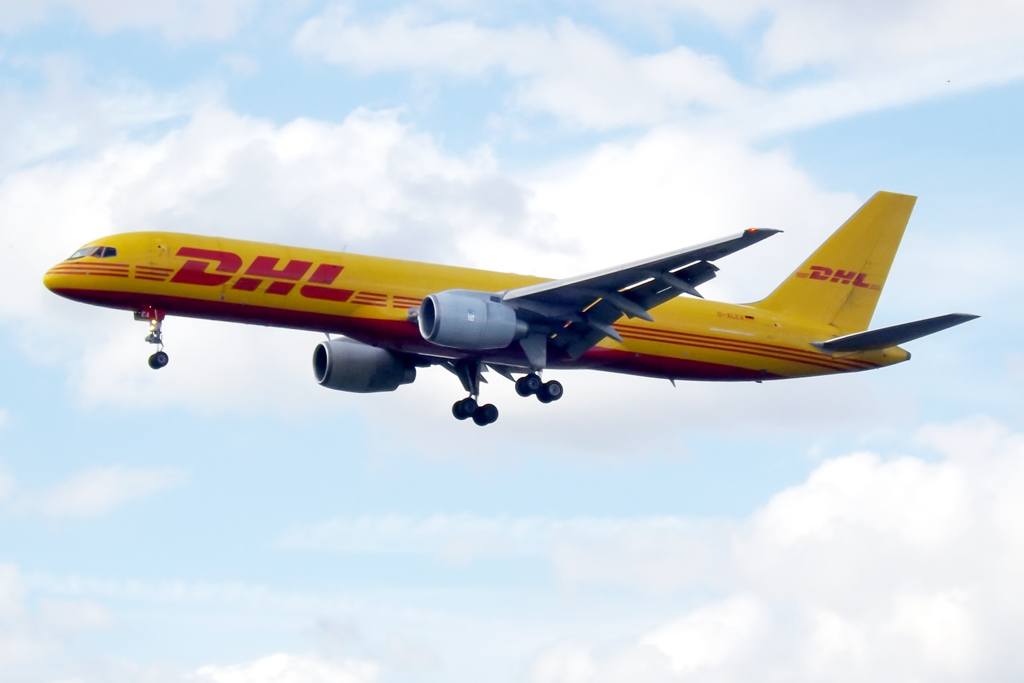 D-ALEA Boeing 757 DHL